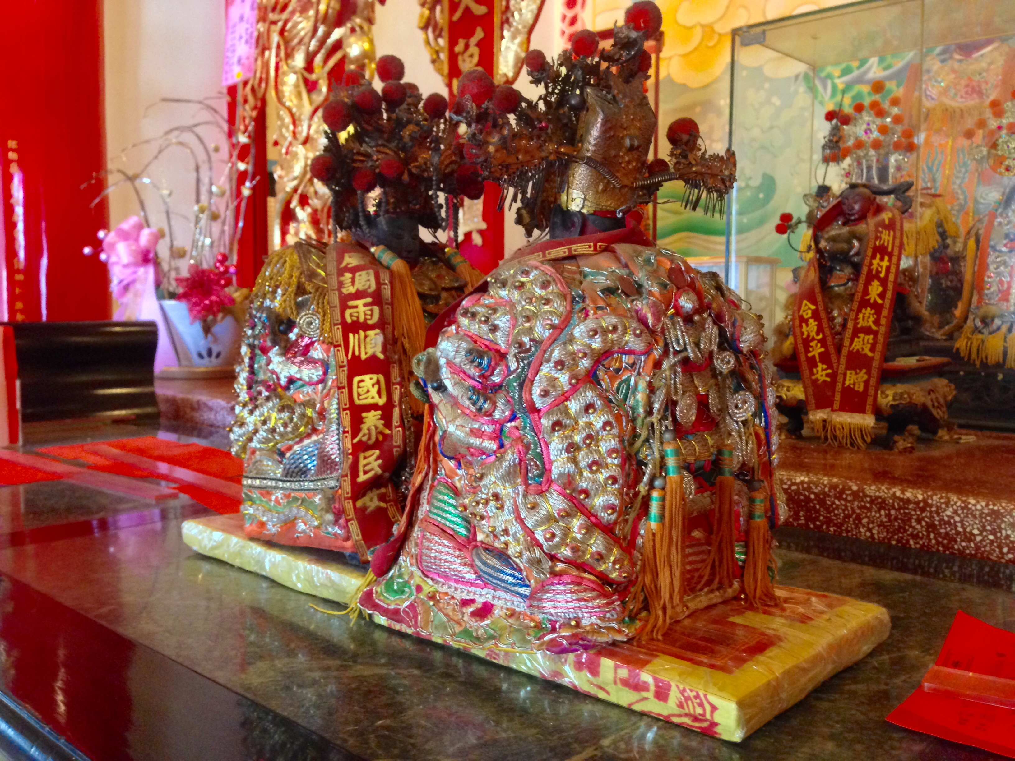 中文（台灣）: 百八番烏龍大聖公媽廟神像